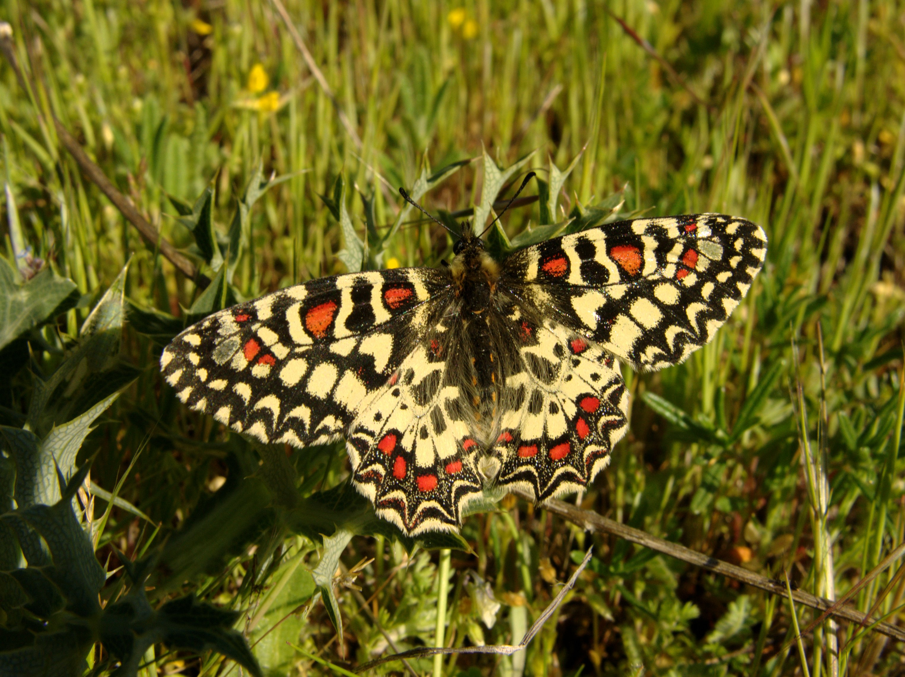 Zerynthia rumina (Papilionidae). Cercedilla, Madrid, España.